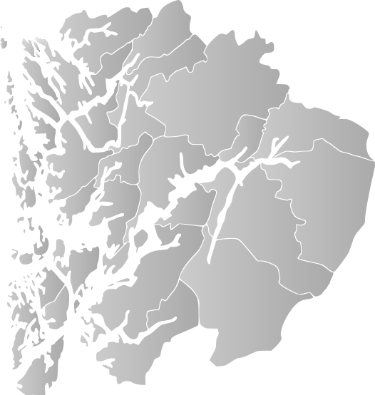 Tomt kart over Hordaland